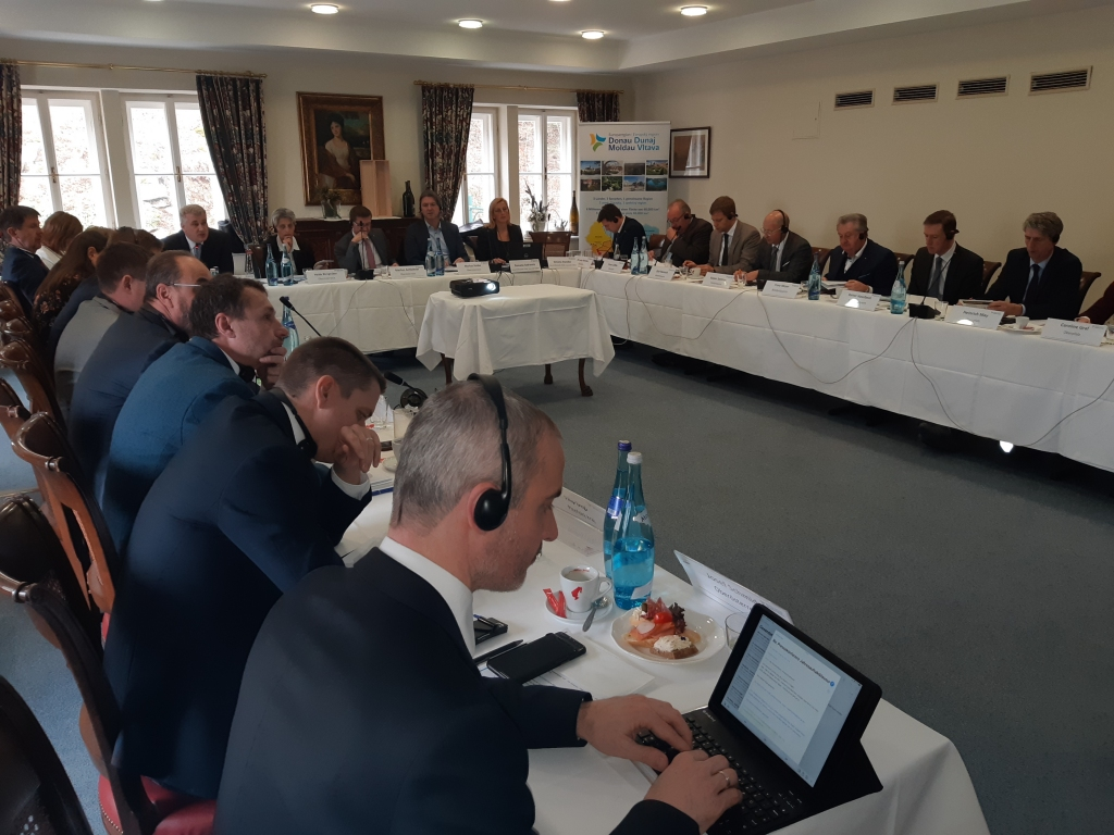 Präsidiumsitzung der EDM